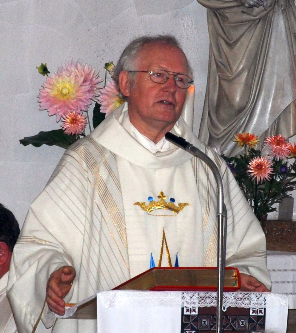 Generalvikar Raimund Sternal bei der Verabschiedung der Maristenmissionsschwestern (S.M.S.M.) aus Dessau am Hochfest Mariä Aufnahme in den Himmel